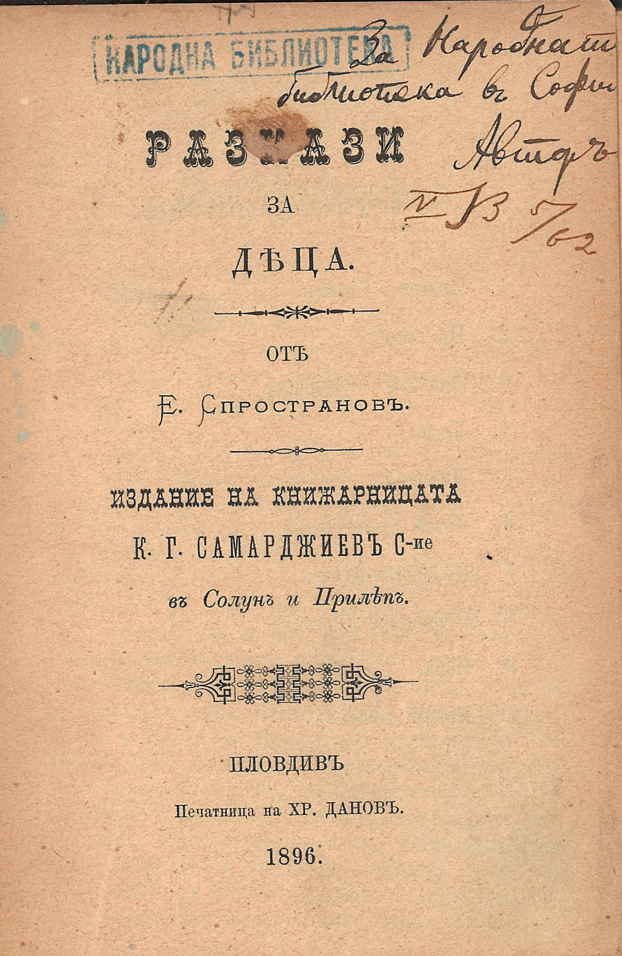 Евтим Спространов. Pазкази за деца, издадени в Солун и Прилеп от книжарницата на К. Г. Самарджиев & Cиe и в Пловдив от печатницата на Хр. Данов